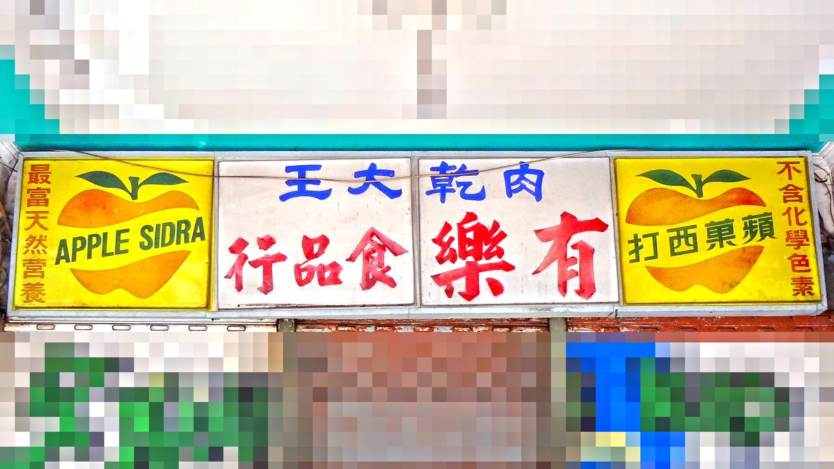 中文（台灣）: 臺北市萬華區武昌街二段，大西洋飲料蘋果西打經銷店廣告燈箱。